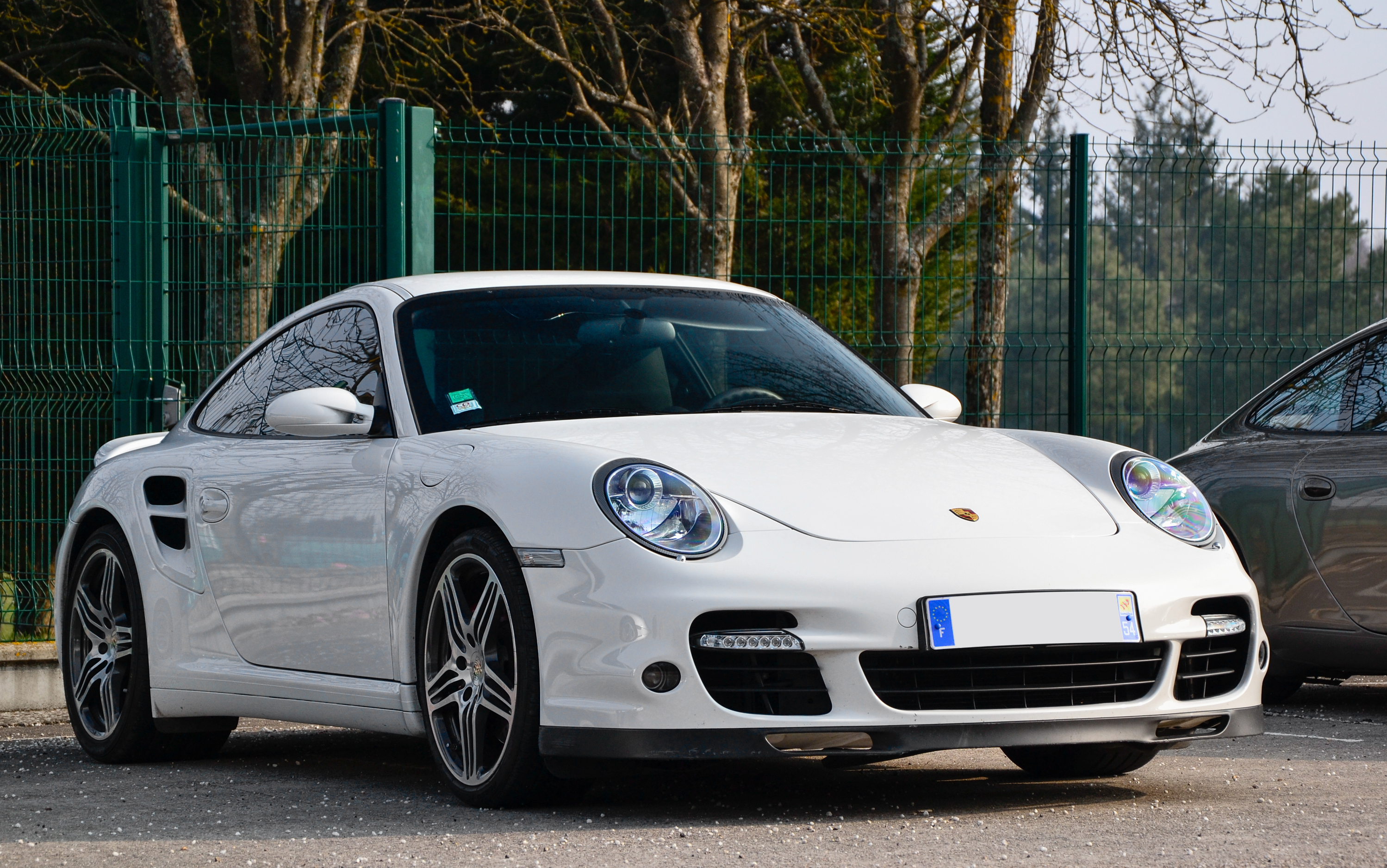 Porsche 997